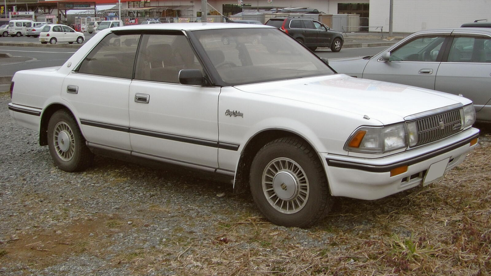 トヨタ・クラウン（S130型ハードトップ）